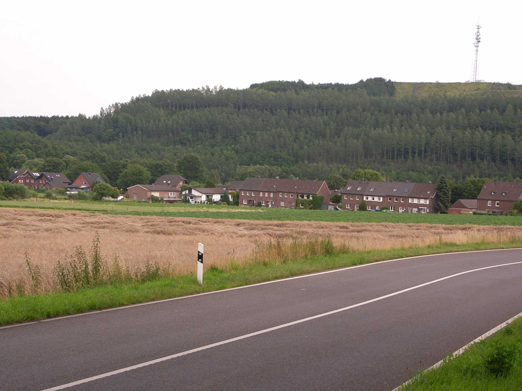 Hückelhoven-Altmyhl